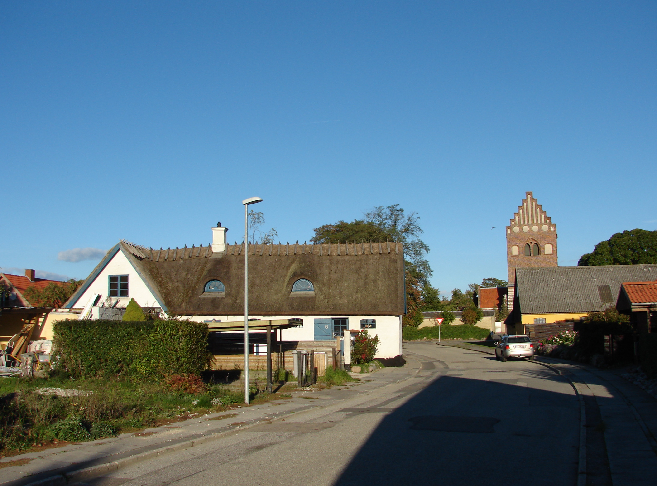 Tårnby, Amager ø ved København